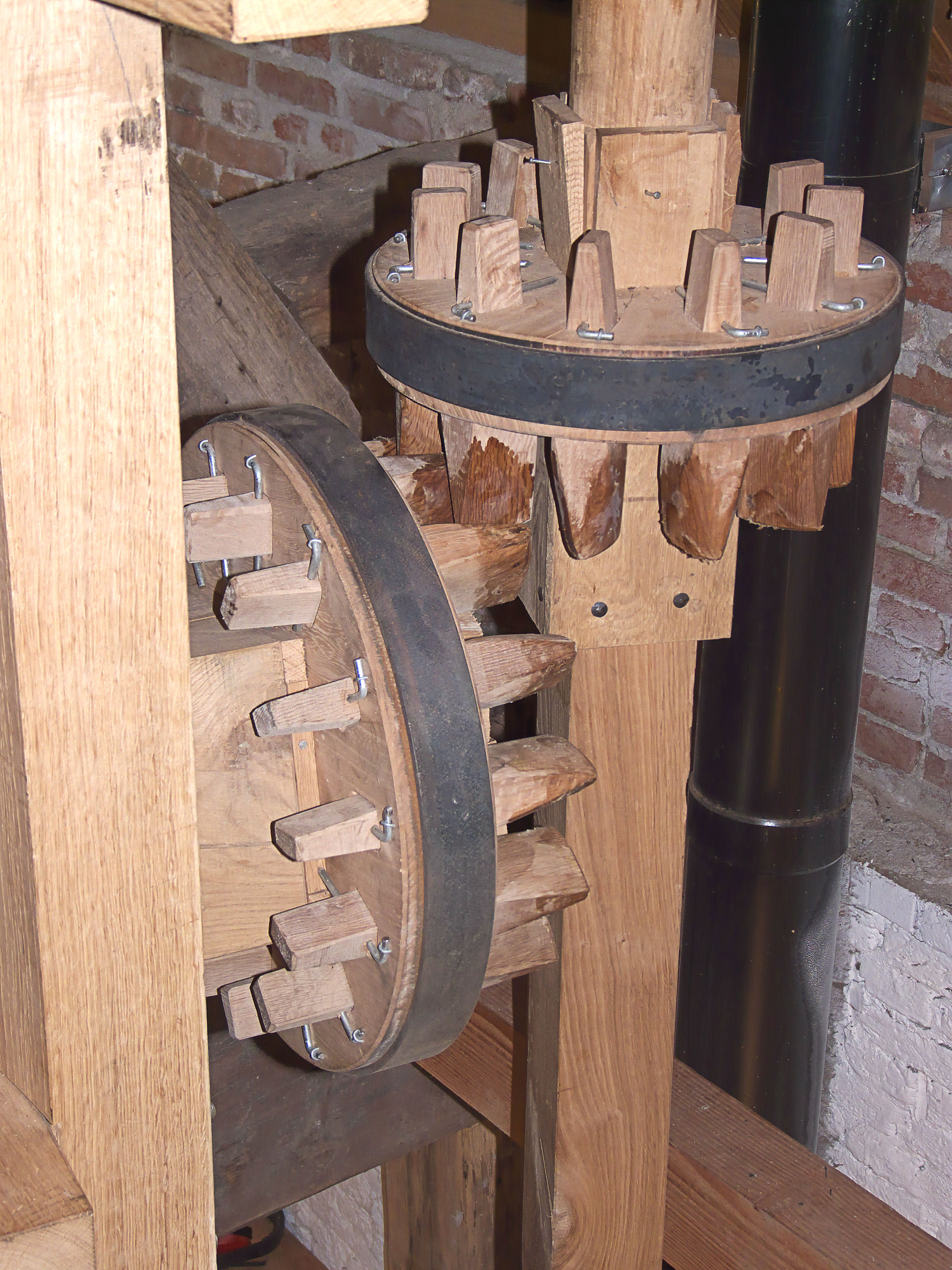 Kilsdonkse molen, Dinther, overwerker met kroonwieltje voor aandrijving roerijzer